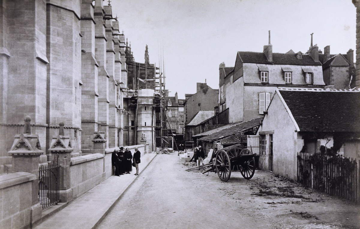 Moulins (Allier), la cathédrale en travaux, années 1860 Épreuve d'époque sur papier albuminé d'après négatif verre montée sur support bristol. 23,6 x 36,7 cm. Support : 48 x 63 cm. Dans cette image, un groupe d'hommes prend la pose au pied de l'édifice : l'évèque Simon Louis Marie de Dreux-Brézé accompagné probablement du curé ou du doyen du chapitre de Moulins ; les deux laïcs sont sans doute les architectes Eugène Millet et Paul Selmersheim.